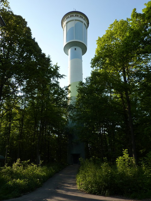 Wasserturm Sindelfingen, 4 km from Böblingen, Deutschland (Zone 32).